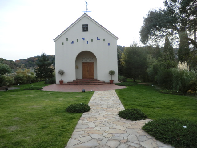 北九州市の結婚式場「光と風の教会」です。